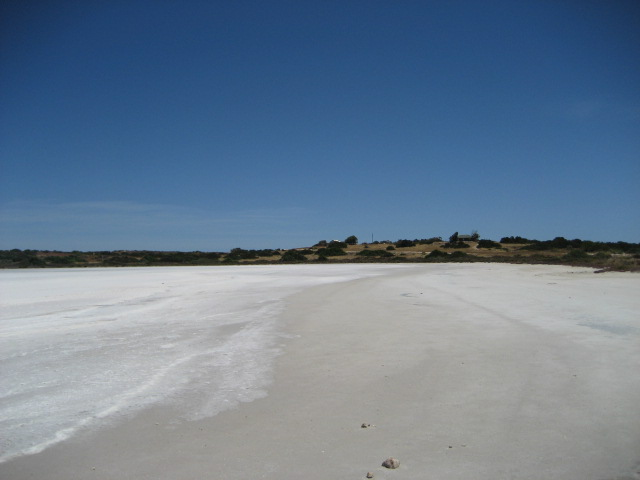 coorong, sa